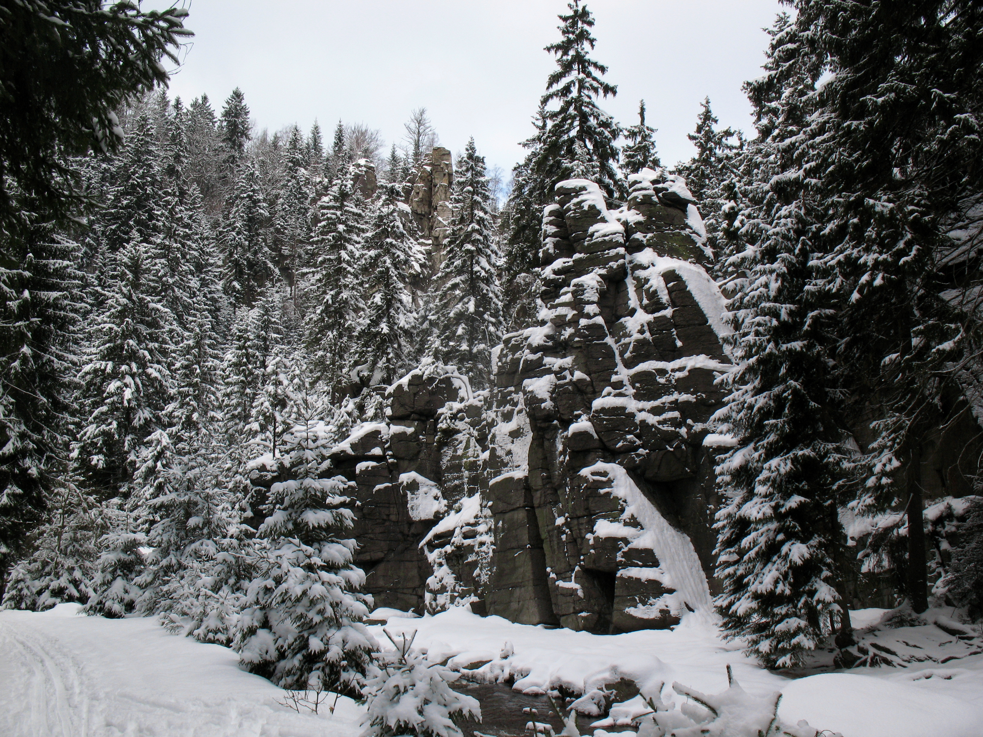 Schwarzwassertal zwischen Kühnhaide und Pobershau im Winter